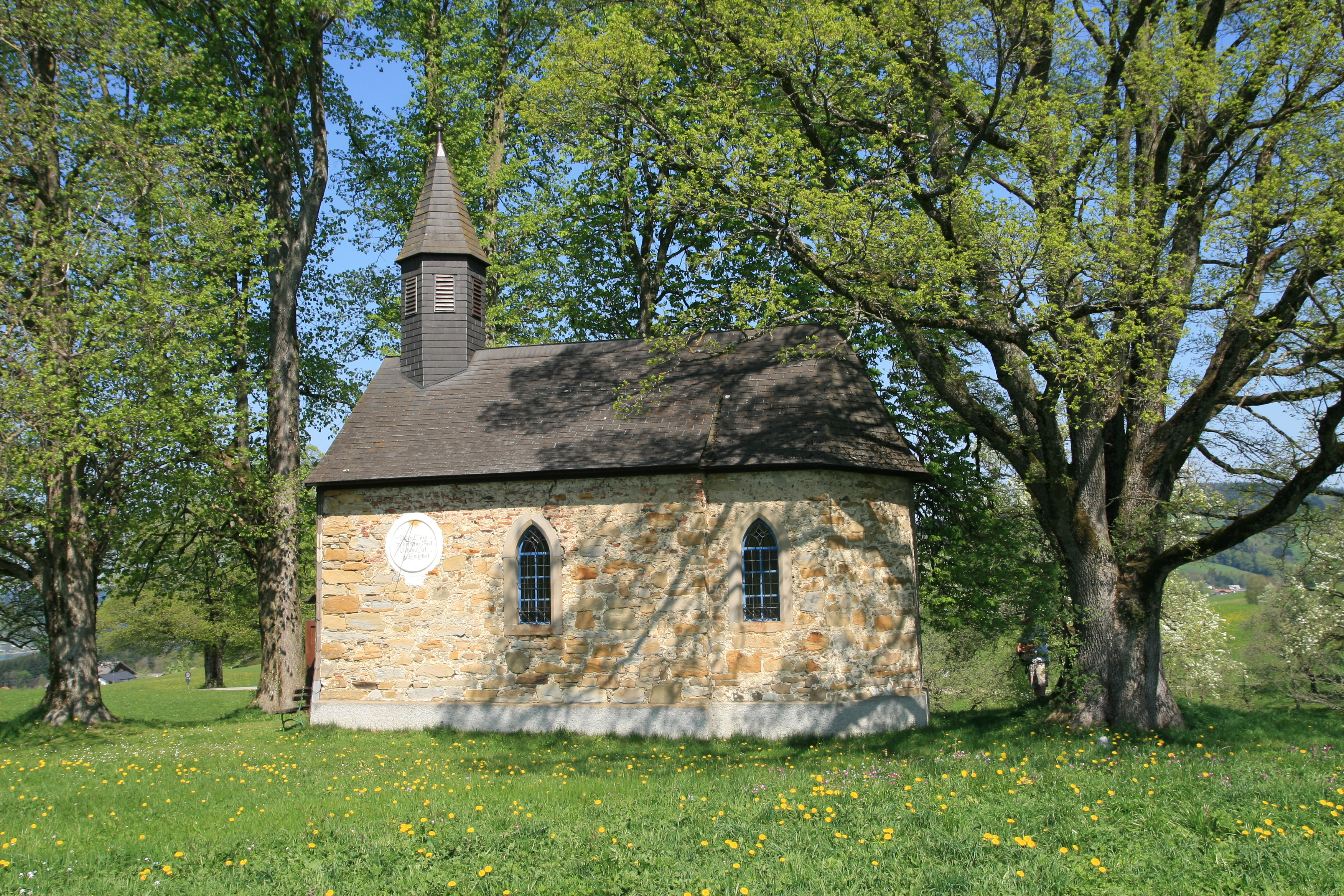 Hofkapelle, Lindenbauer-Kapelle, Zell am Moos